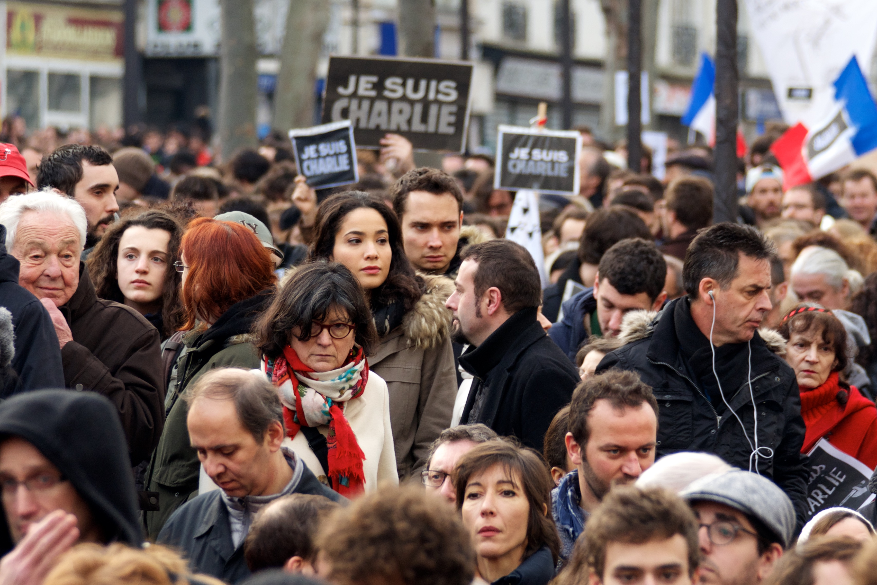 Marche républicaine en hommage aux morts des attentats à Paris des 7, 8 et 9 janvier 2015 et contre toute forme de discrimination, antisémitisme, obscurantisme et exclusion.